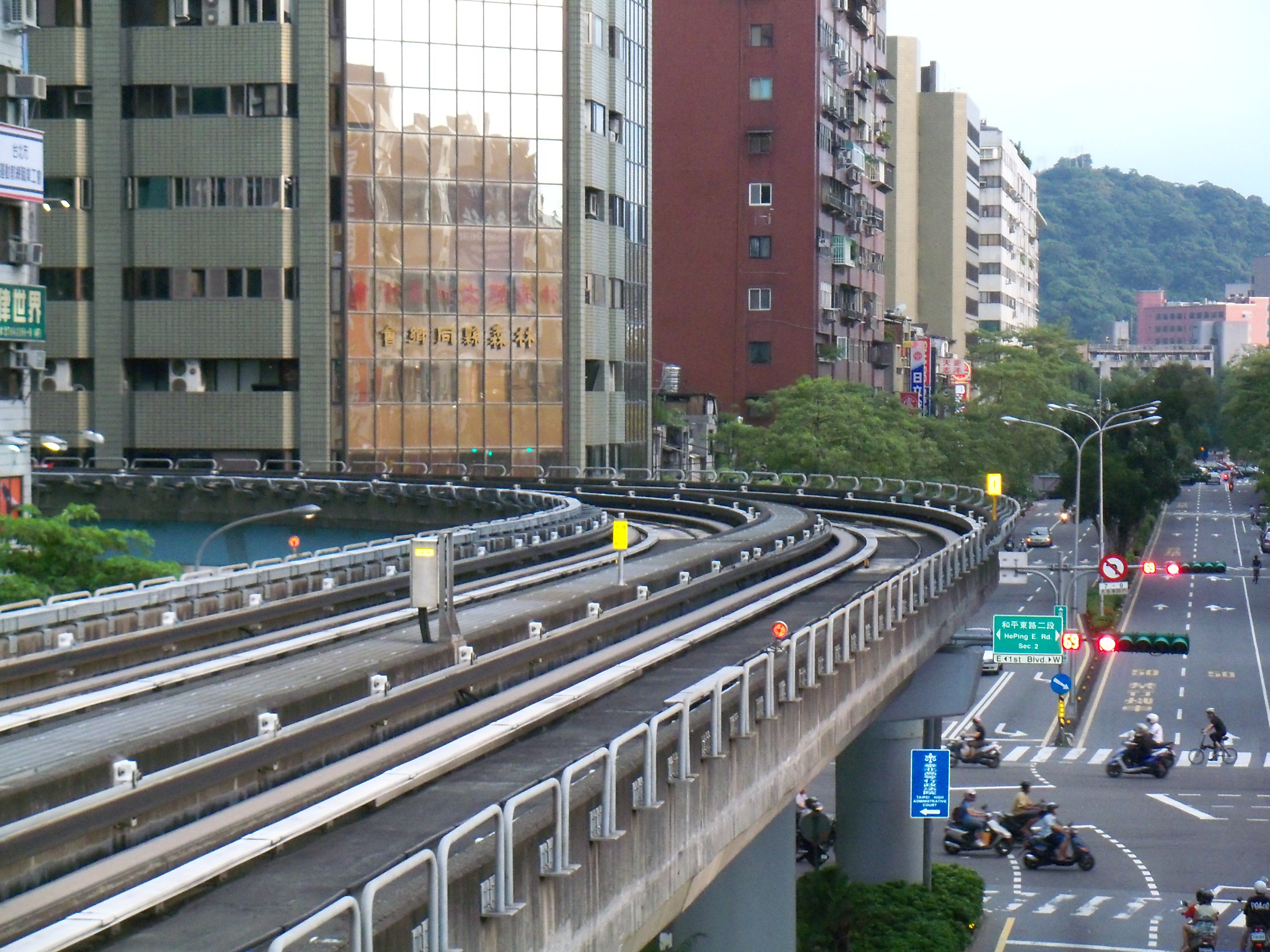 台北捷運科技ビル駅直前、復興南路二段と和平東路二段交差点の文山線名物大カーブ。